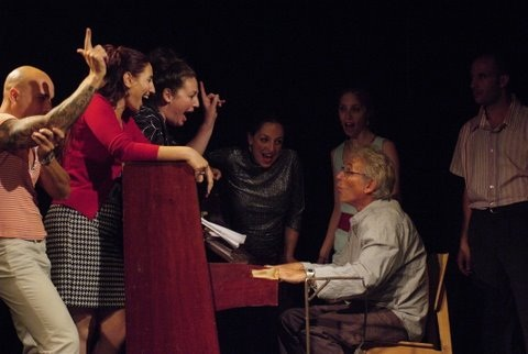 יוסי מר חיים מלווה את שחקני קבוצת התיאטרון רות קנר צילום אלדד מאסטרו (1)